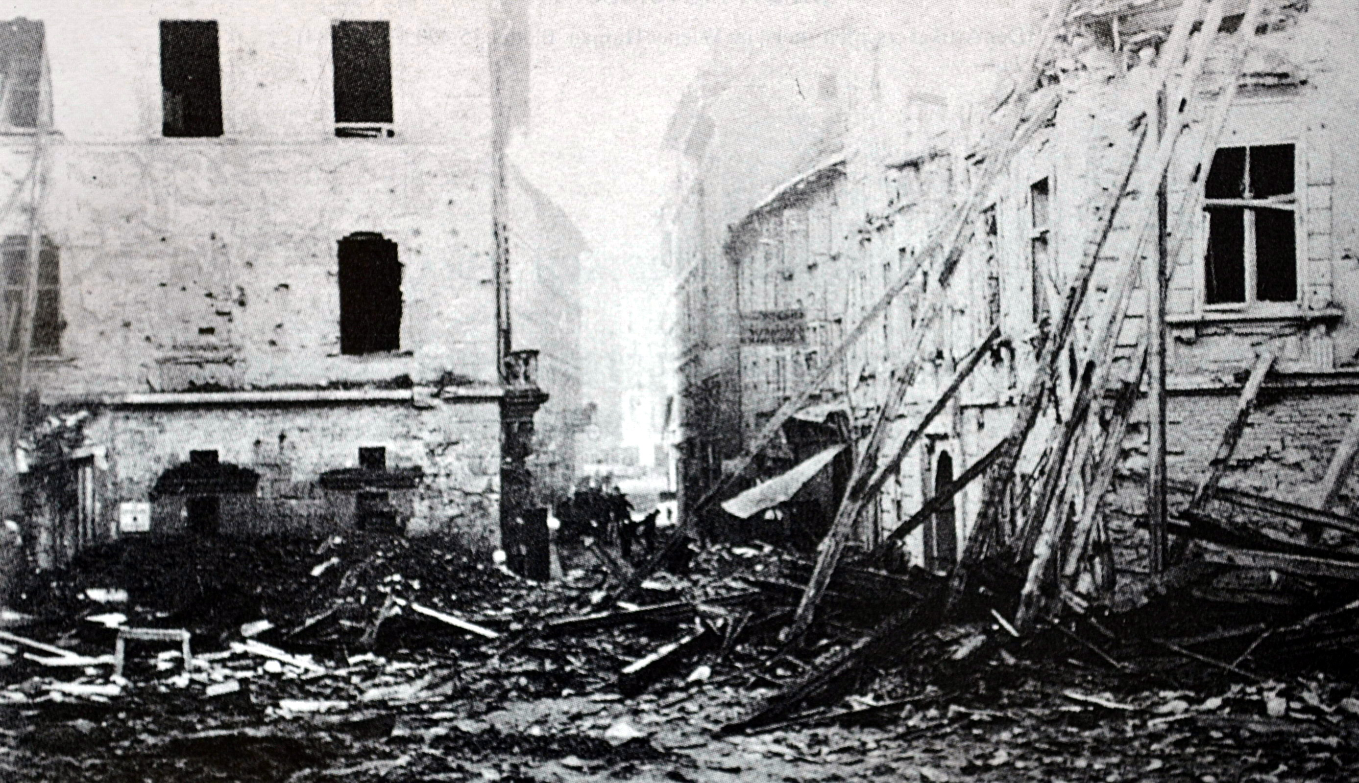 Blick vom Akademischen Gymnasium Graz auf die Hans-Sachs-Gasse, 1. November 1944; Aufnahme in Privatbesitz des Autors. Das Bild wurde auch verwendet und veröffentlicht im Buch: Jahresbericht des Akademischen Gymnasiums Graz 1993/1994, Hrsg.: Akademisches Gymnasium Graz. Selbstverlag des Akademischen Gymnasiums Graz. Graz 1994, Seite 3. Weiters wurde das Bild im Rahmen einer öffentlichen Ausstellung zum 50. Jahrestag des Bombenangriffes auf Graz am 1. November 1944 während des Schuljahres 1993/1994 im Akademischen Gymnasium Graz ausgestellt.